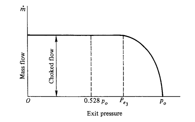 ספיקה מסית כתלות בלחץ יציאה משתנה בזרימה חנוקה